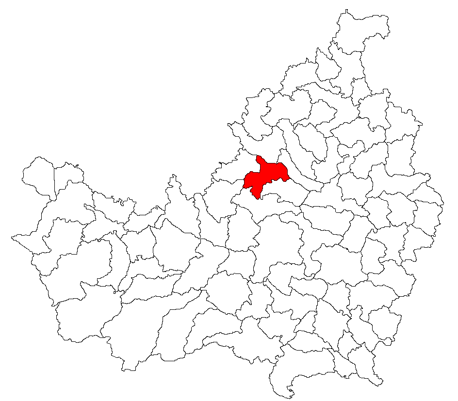 Categorie:Hărţi ale judeţului Cluj